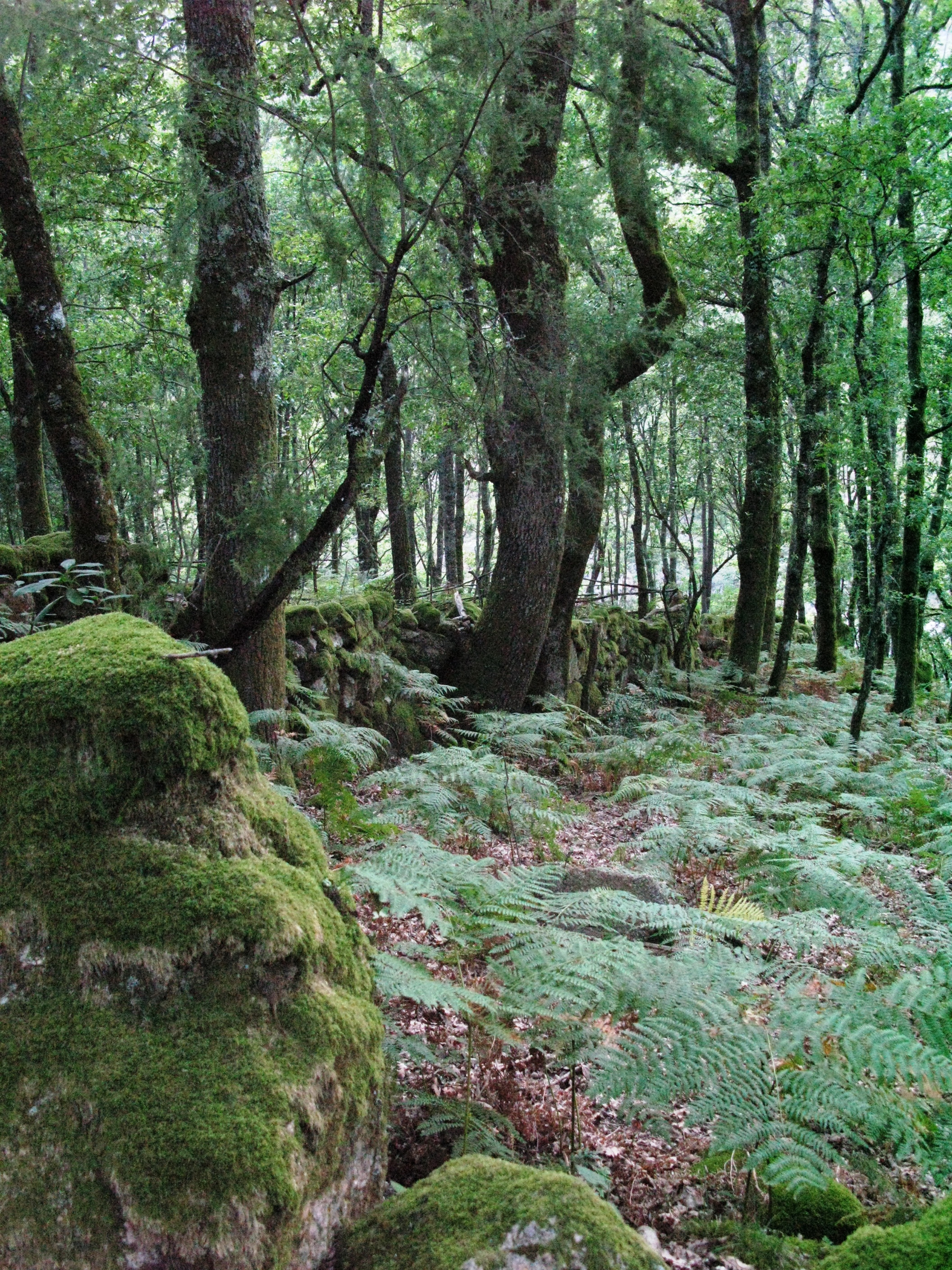 PNPeneda/Gerês. Portugal This is a photography of a Site of Community Importance in Portugal with the ID: PTCON0001. Natura2000 entry, EEA entry